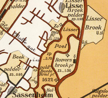 Rooversbroekpolder